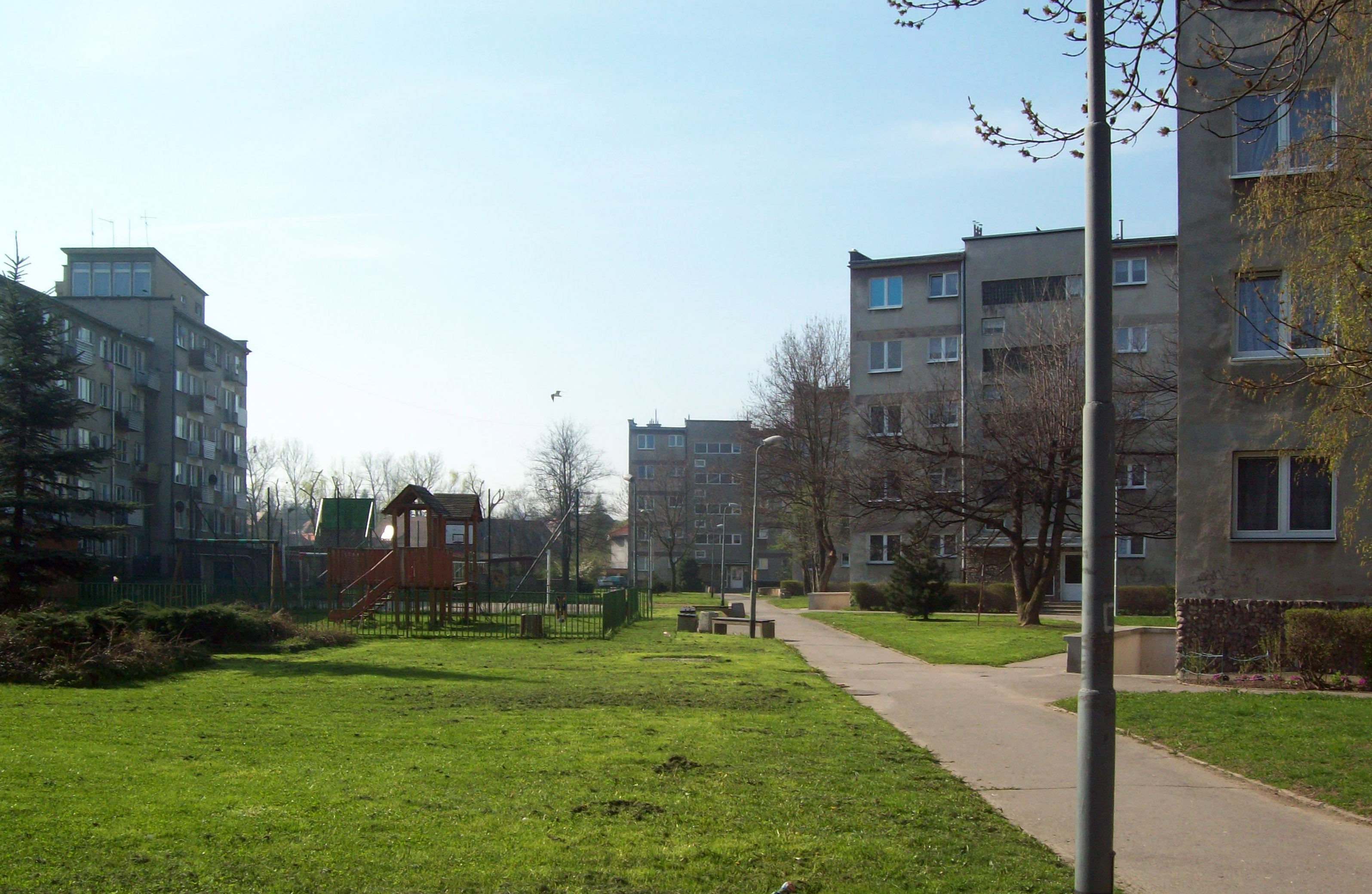 Plac zabaw na os. Nysa w Kłodzku